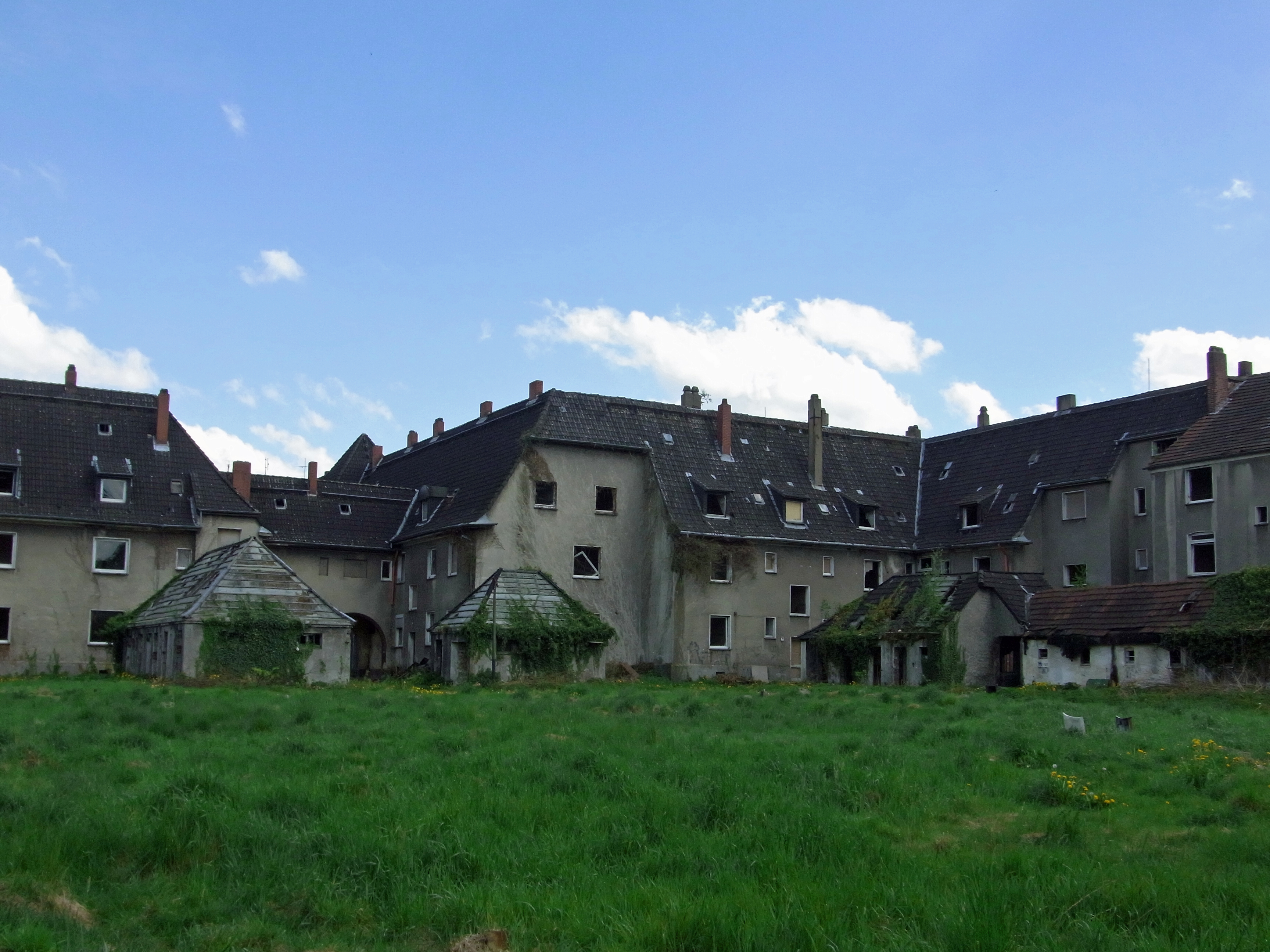 Gladbeck-Zweckel: sogenannte Geistersiedlung,das von der Schlägelstraße, Eisenstraße und Bohnekampstraße umschlossene Areal